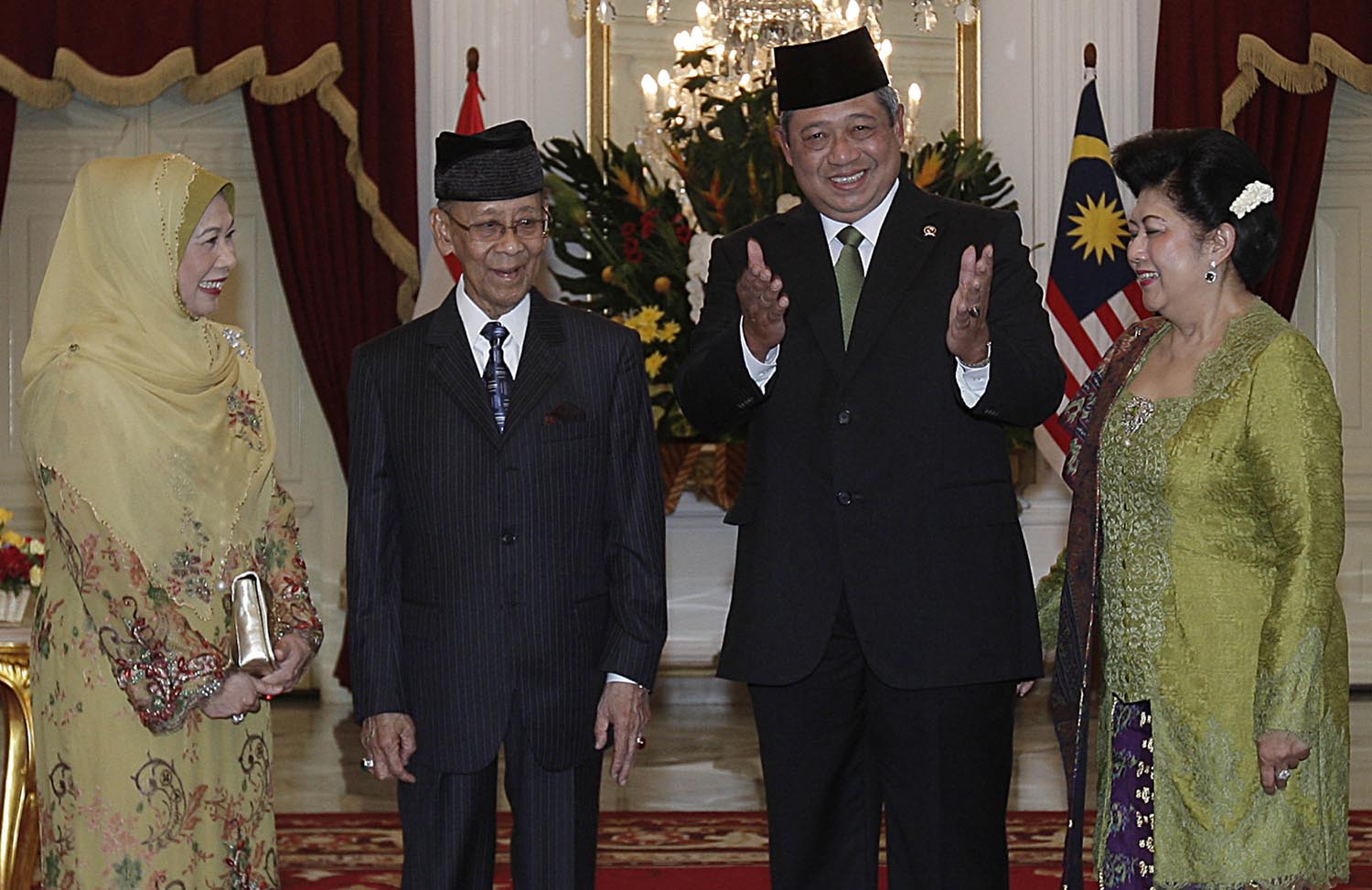 Presiden SBY dan Ibu Ani menerima kunjungan kenegaraan Yang di-Pertuan Agong Malaysia, Tuanku Abdul Halim dan Permaisuri Tuanku Hajah Haminah di Istana Merdeka, 4 Desember 2012.